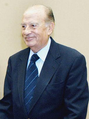 El Dr. Pablo González Casanova, al ser nombrado Doctor Honoris Causa en la Universidad Autónoma de Querétaro, México.